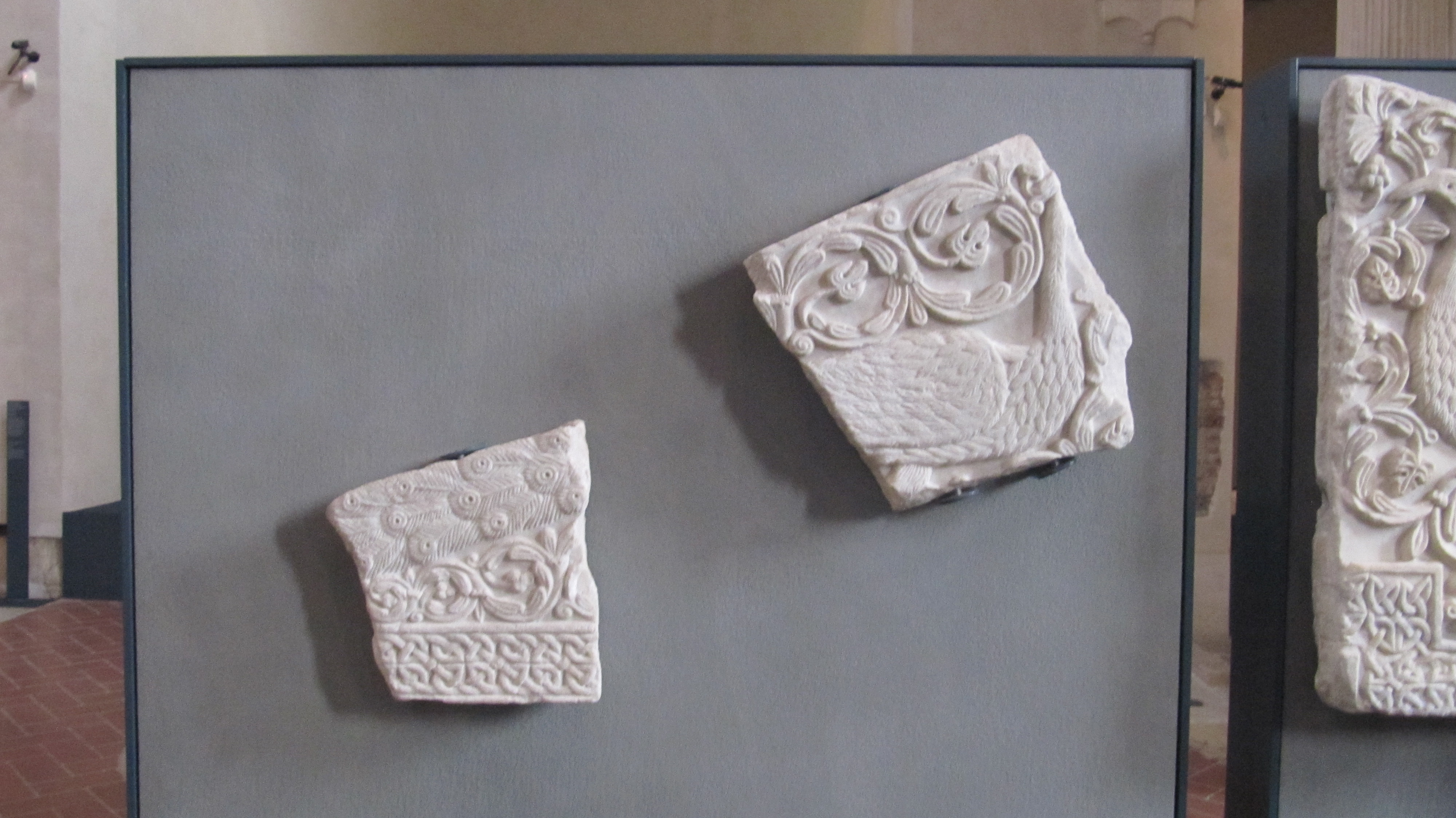 lastra con pavone (secondo frammento) chiesa di san salvatore, brescia